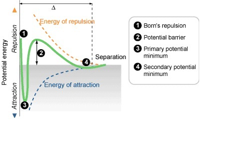 Stabilisation stérique